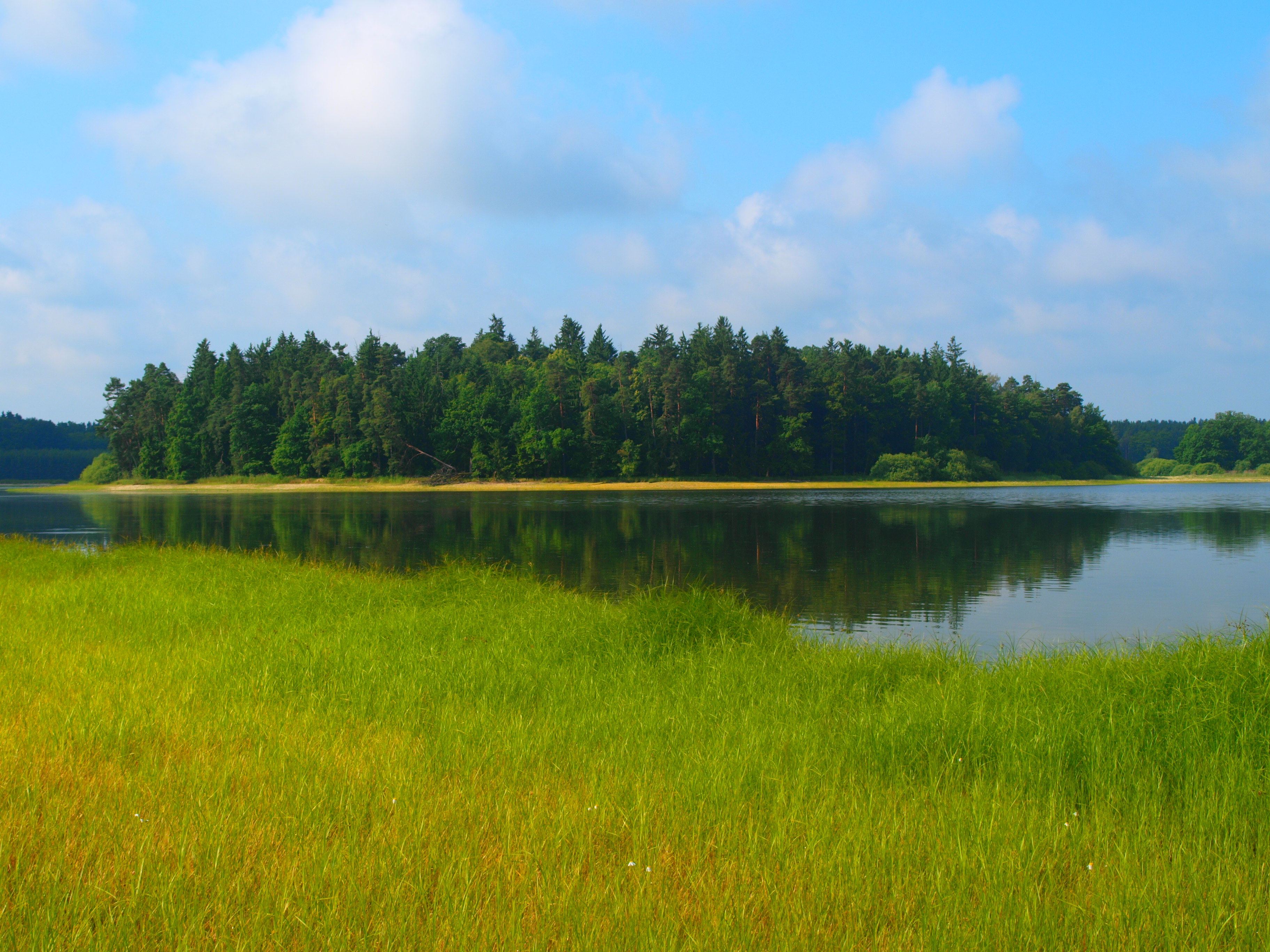 ostrov Naxos na rybníce Velká Holná